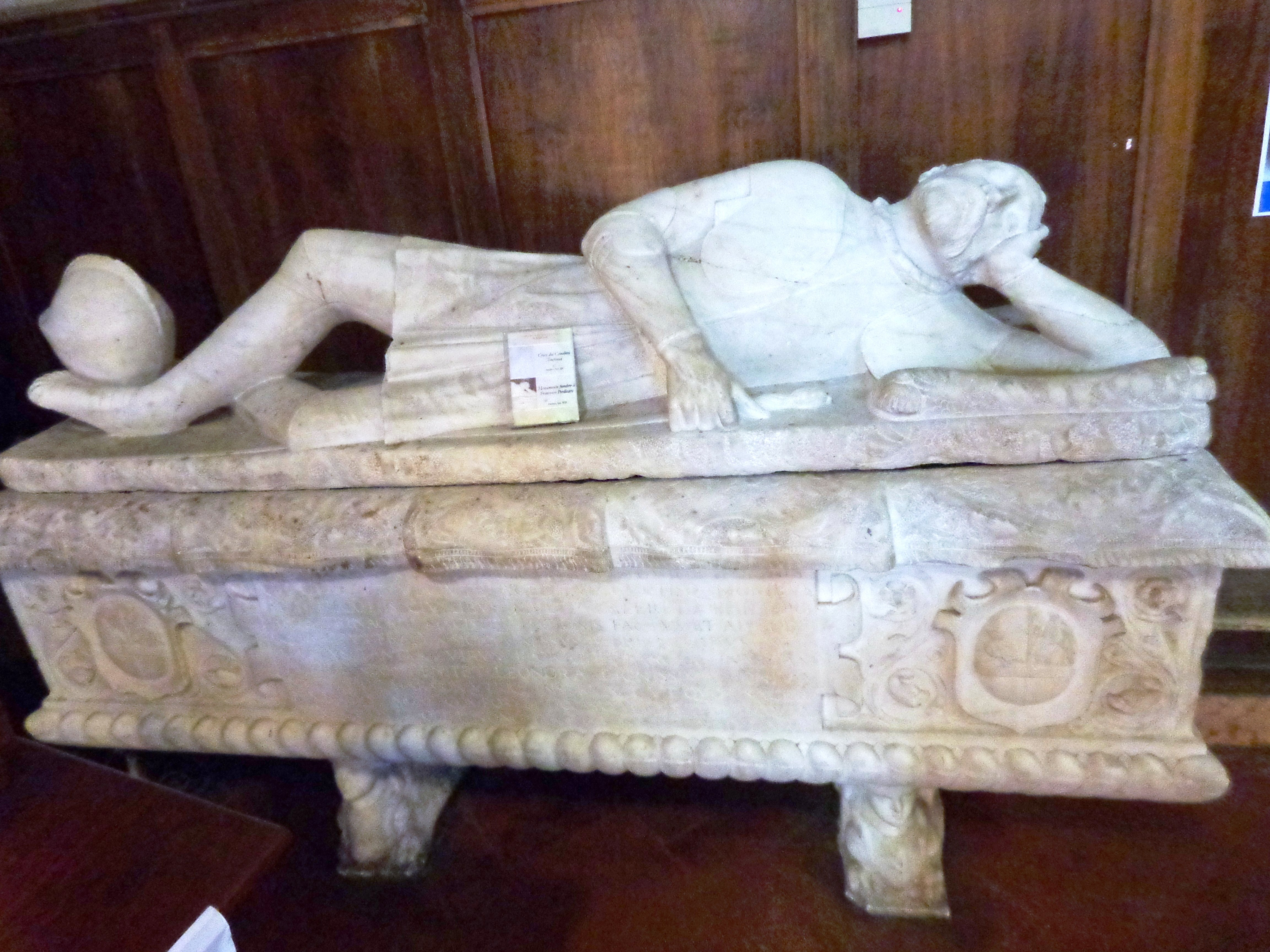 Chiesa_Cancelliere_02